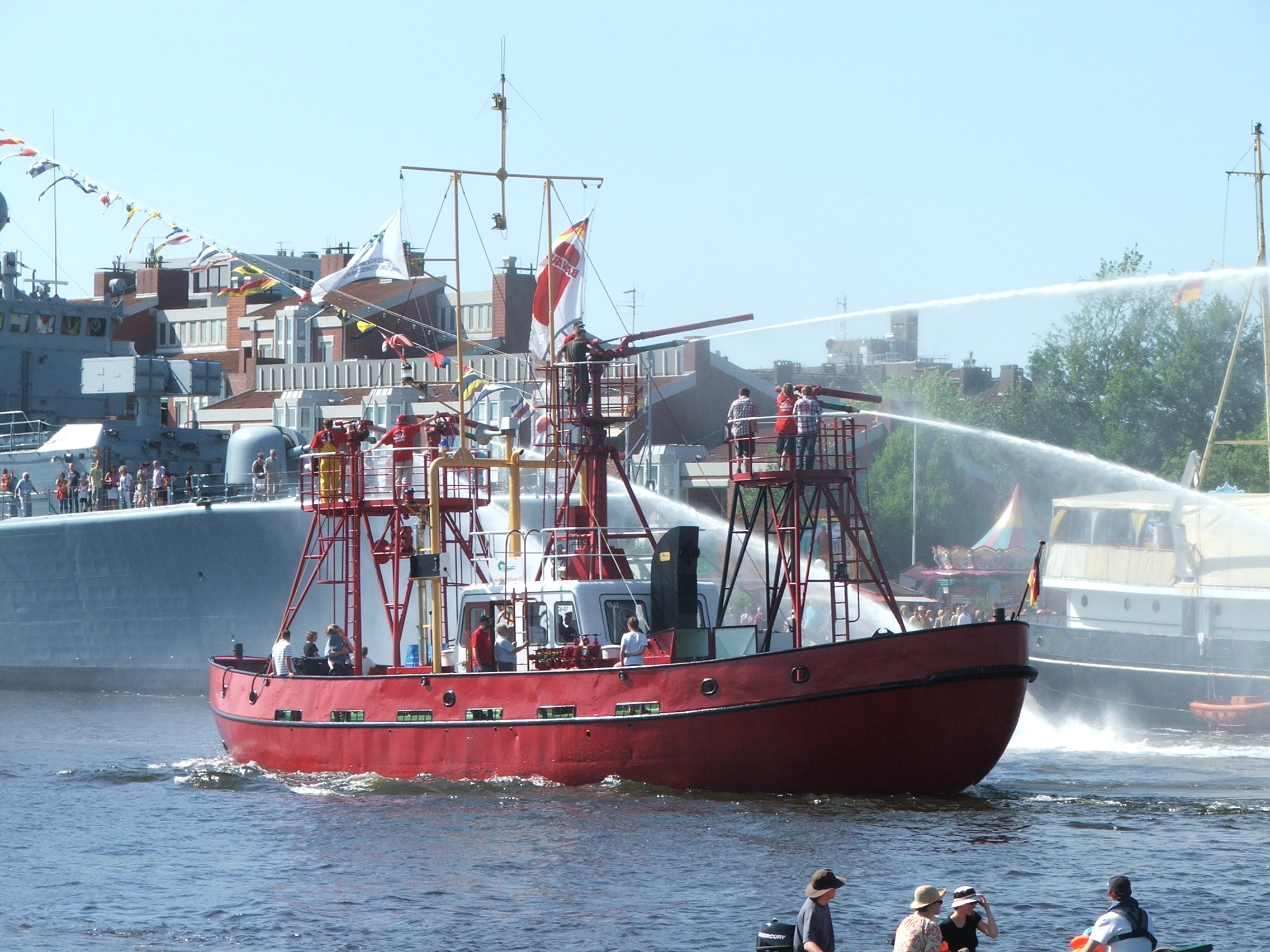 Feuerlöschboot bei einer Vorführung